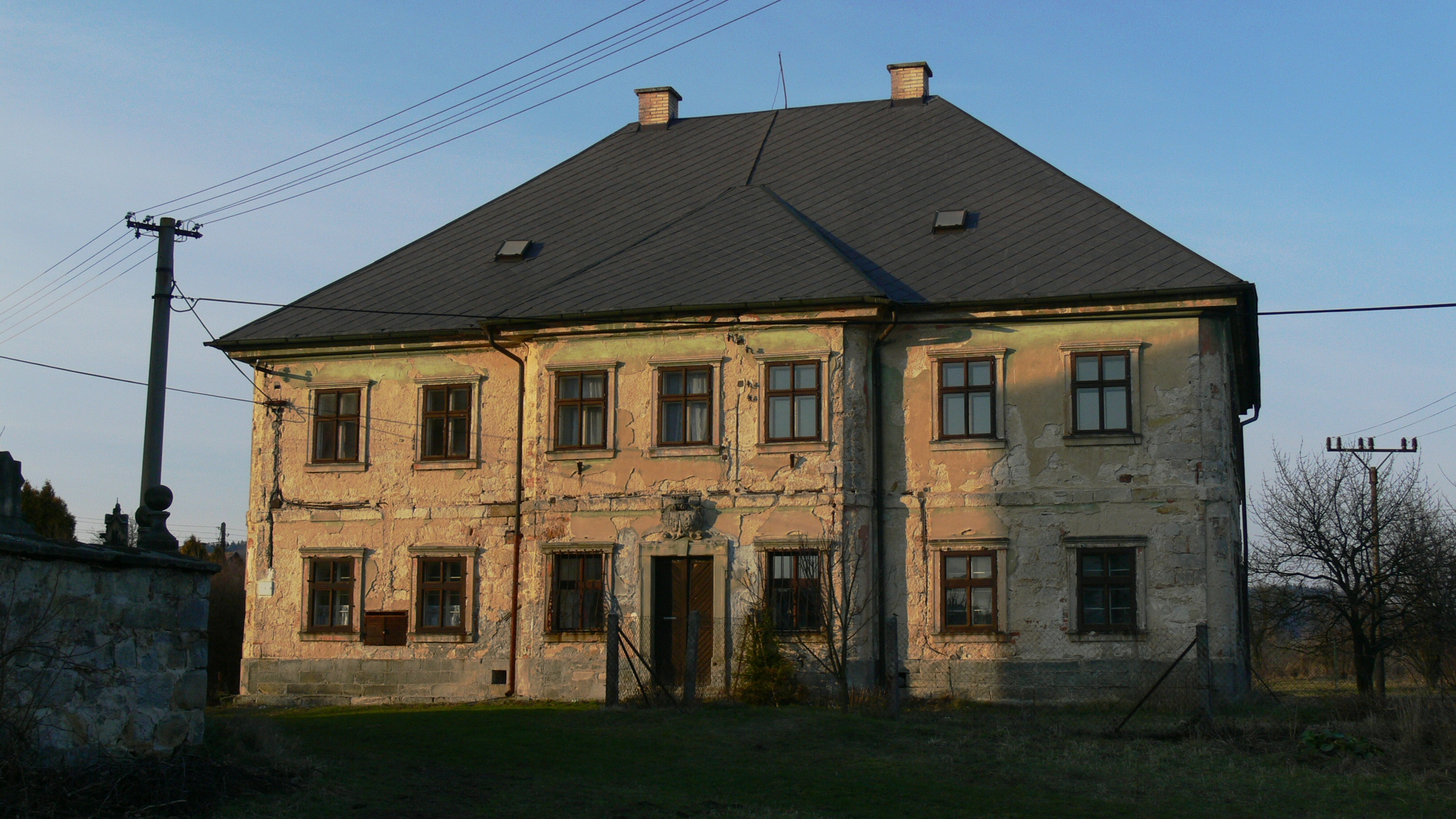 Fara (Ostružno), Ostružno 1